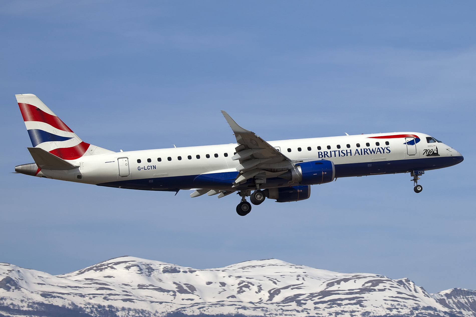 Geneve